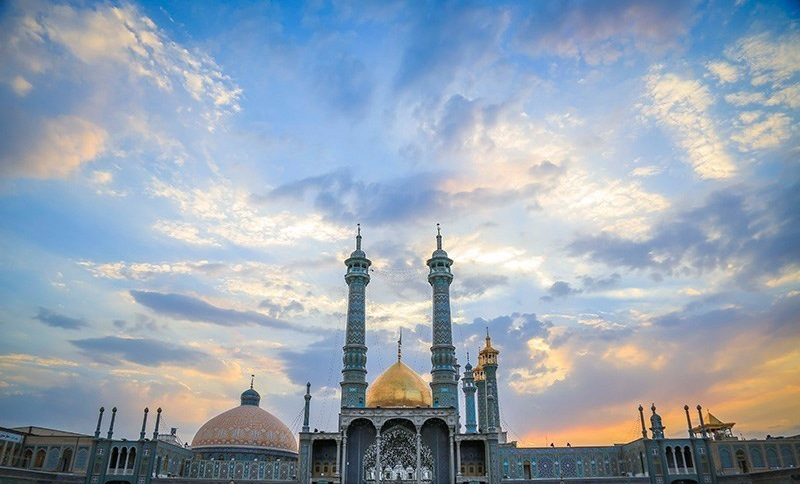 صحن بارگاه فاطمه معصومه در قم